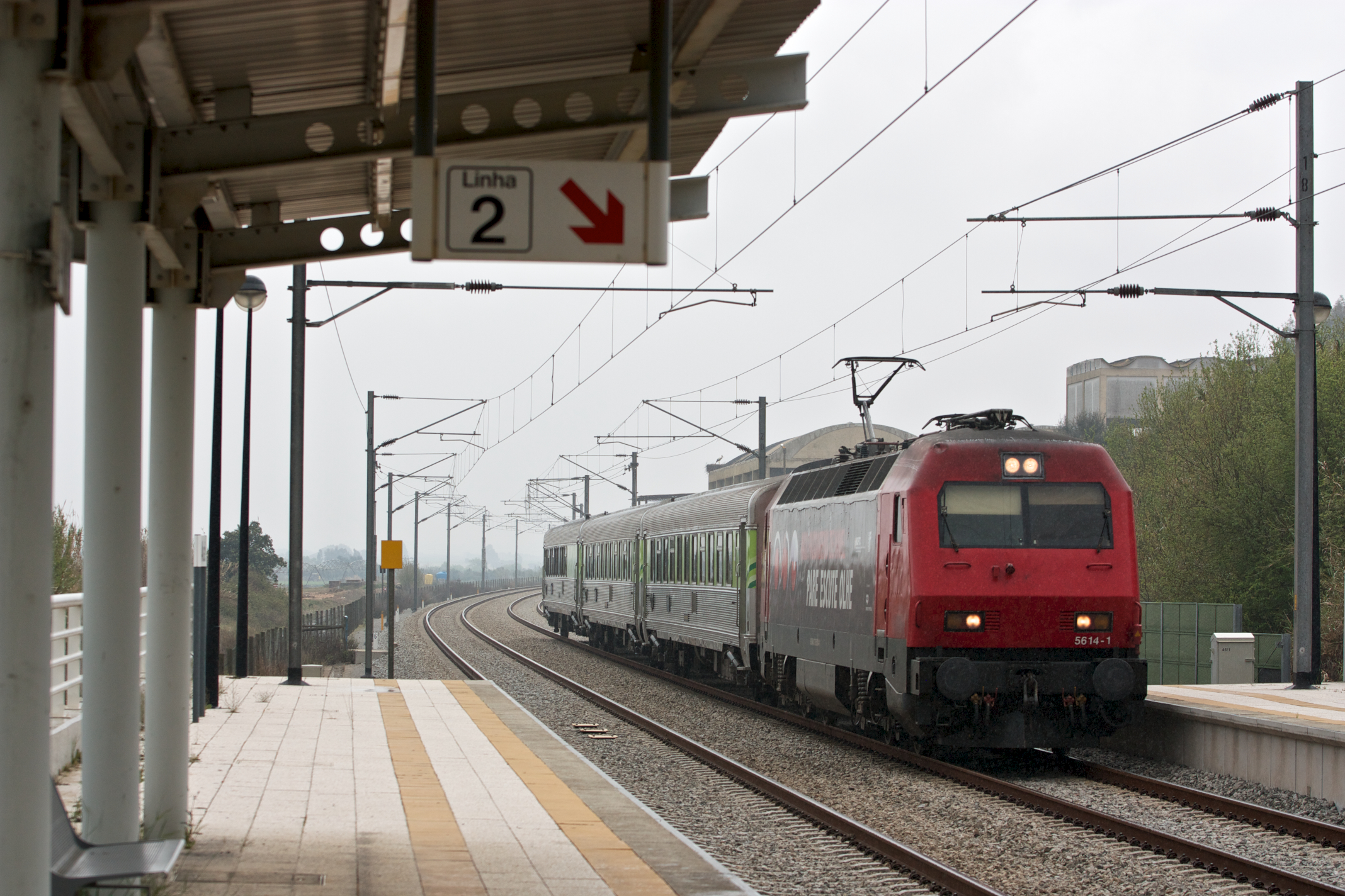 Tipo: Comboio Intercidades 672 [Faro - Lisboa • Oriente] Local: Apeadeiro de Alvalade [Linha do Sul , PK 138] Data e hora: 2 de Abril de 2012 [15h37] Material: Locomotiva 5614 + 3 carruagens Sorefame Renovadas